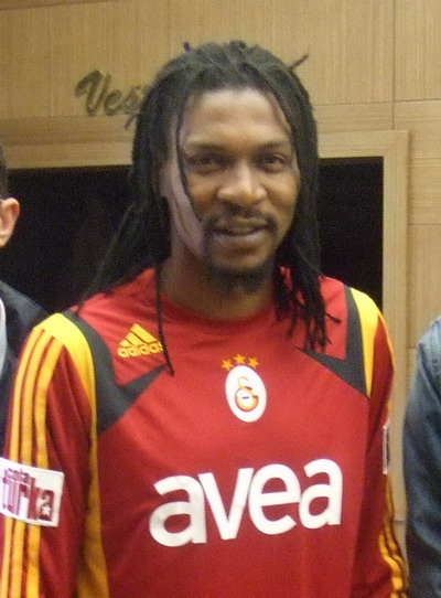 Rigobert_Song